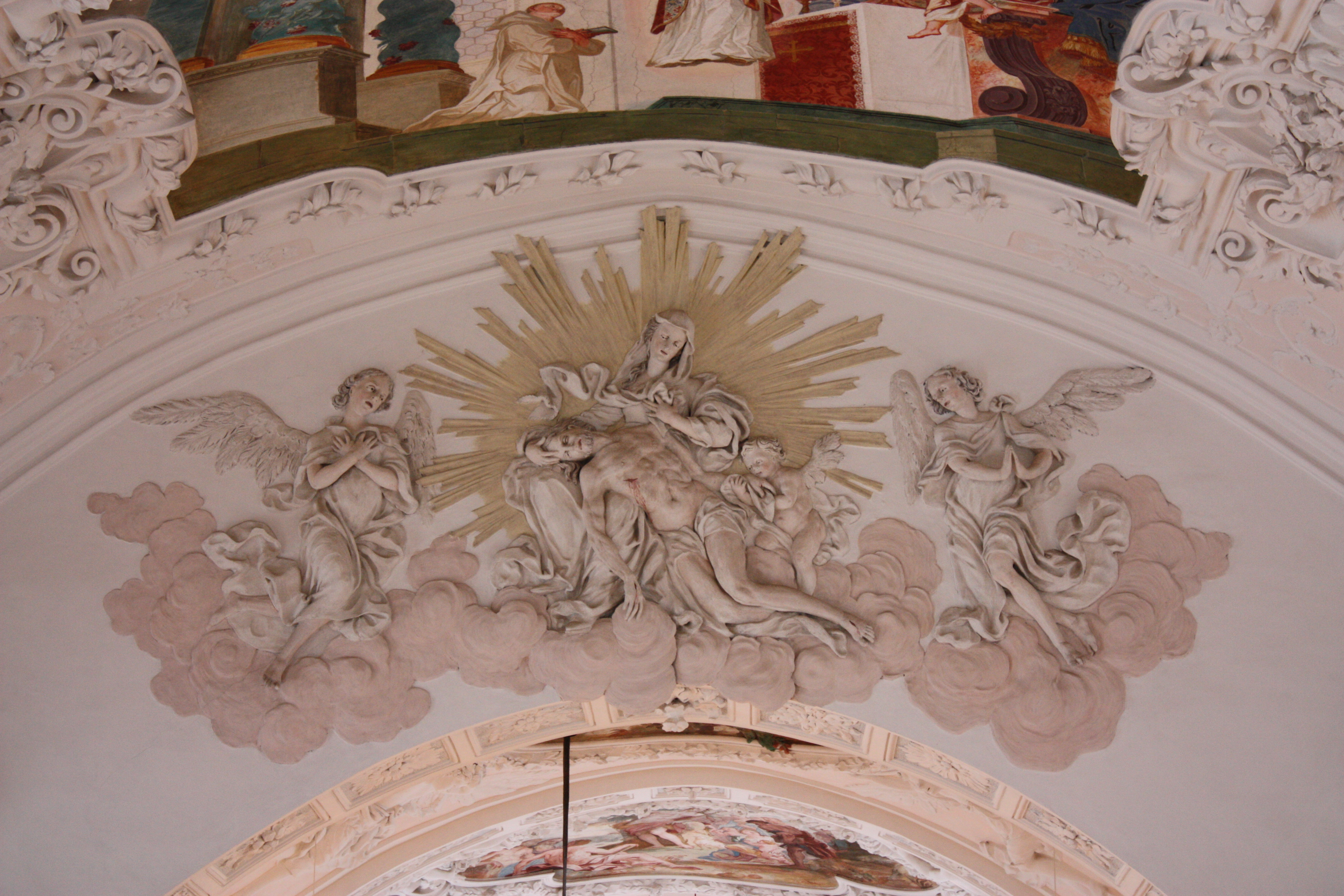 Gemälde in der ehemaligen Klosterkirche der Kartause in Buxheim bei Memmingen - Google Maps - Google Earth